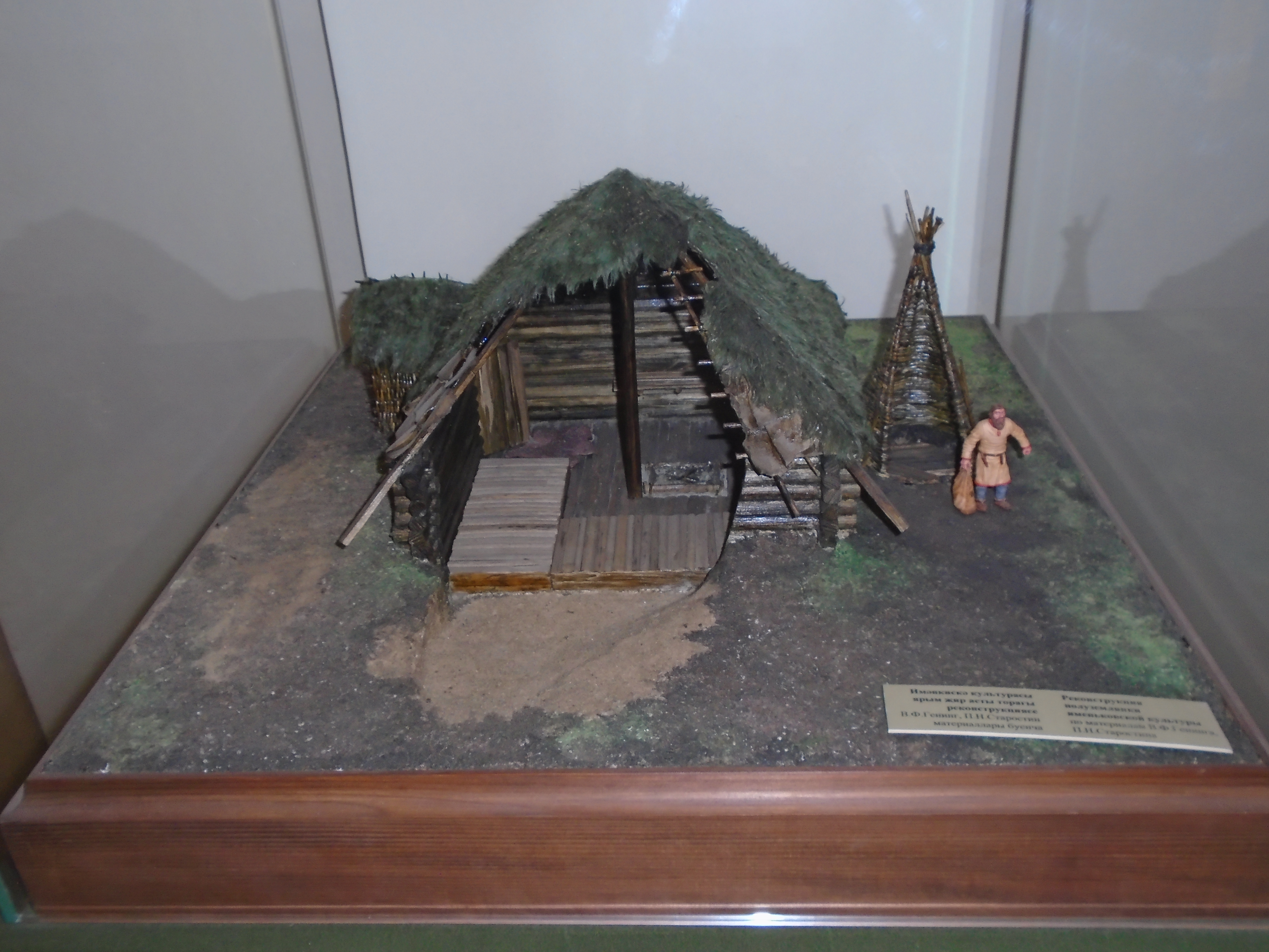 Реконструкция полуземлянки именьковской культуры по материалам В. Ф. Генинга, П. Н. Старостина.